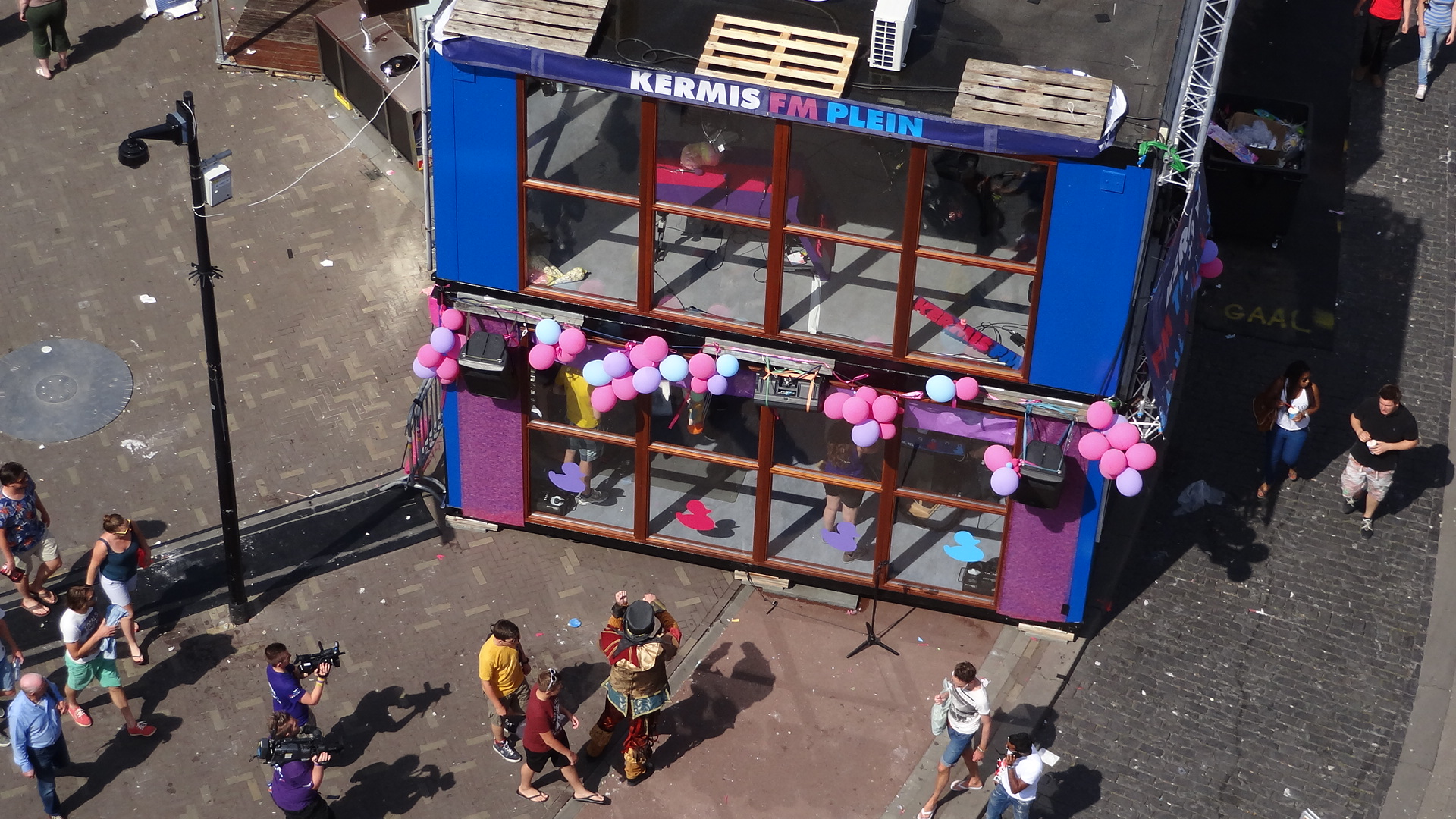 Kermis FM plein in 2014